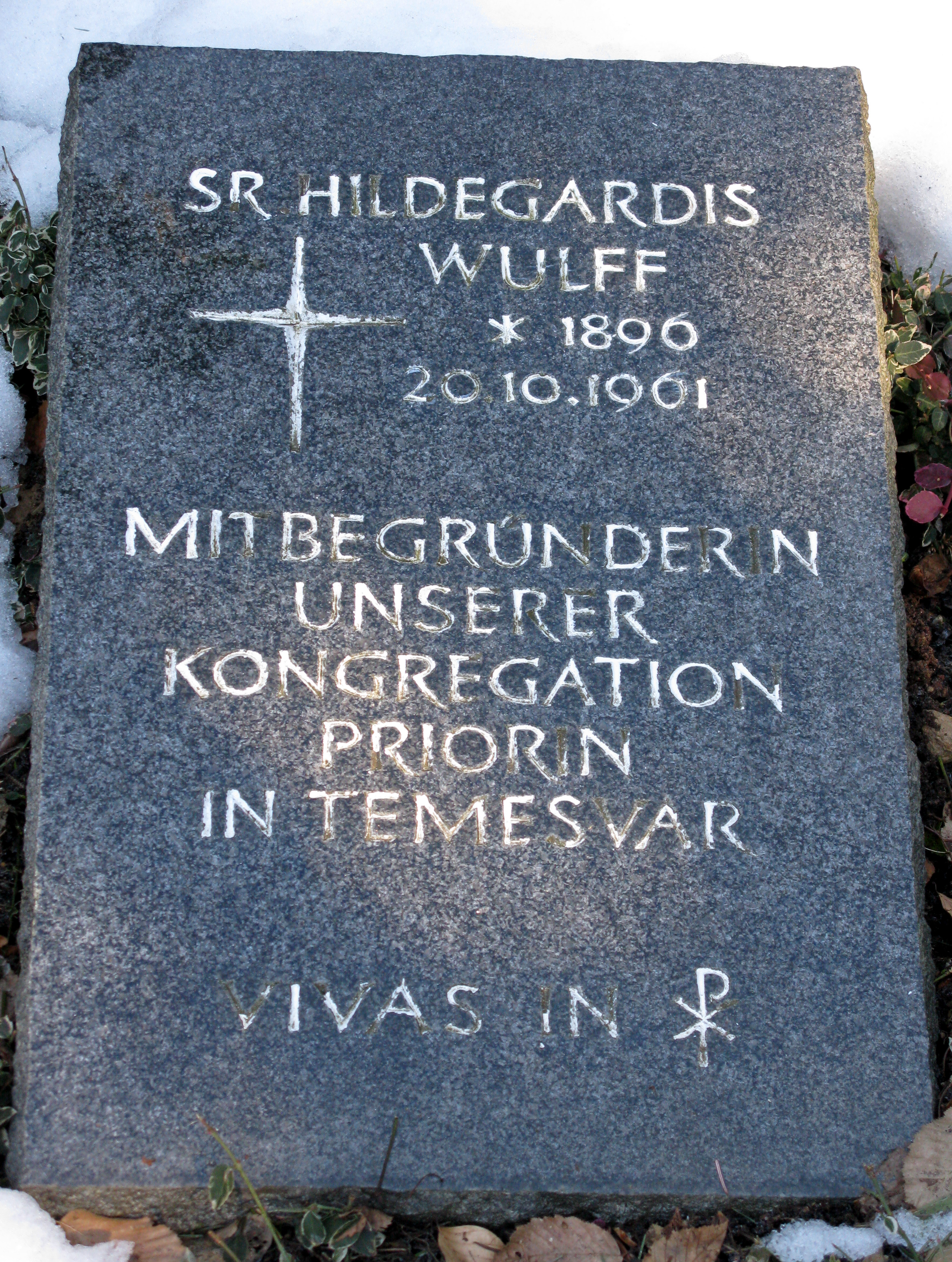 Grab von Hildegardis Wulff auf dem Friedhof des Klosters St. Lioba in Freiburg-Günterstal